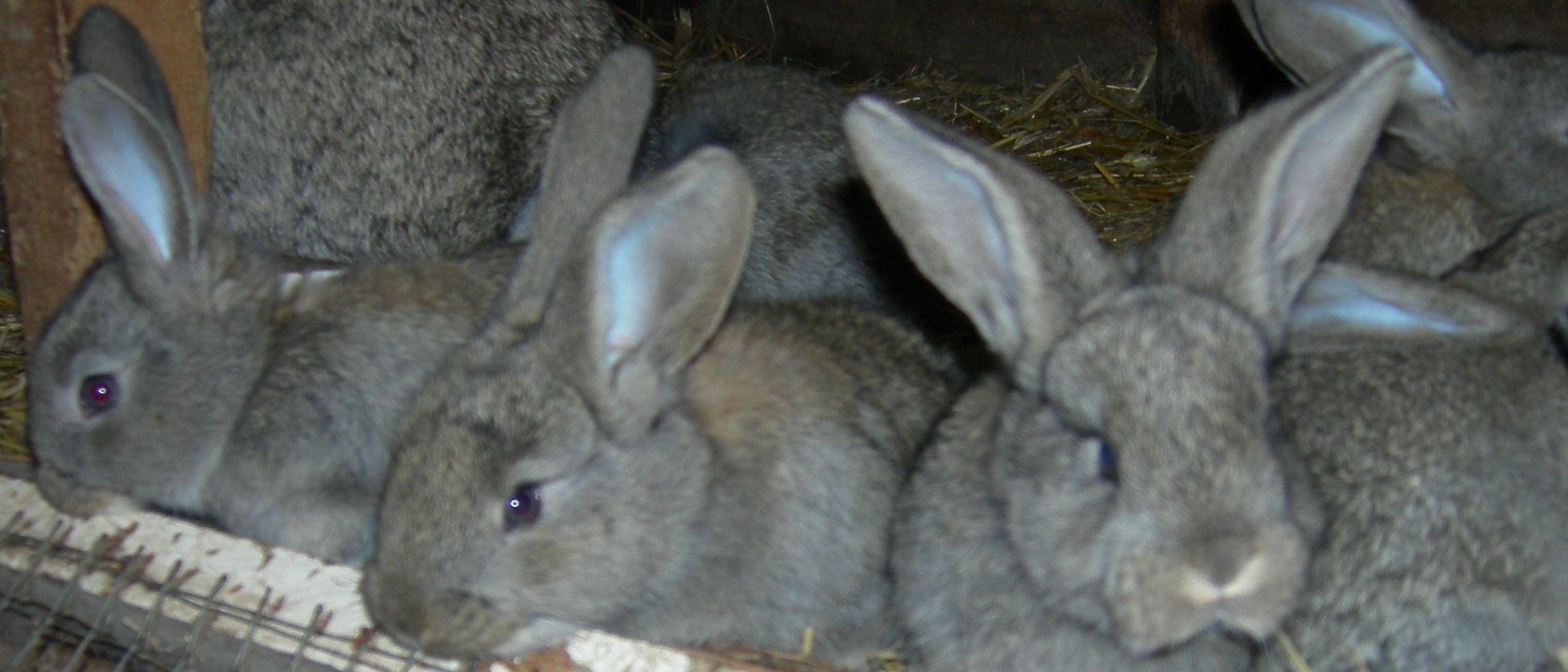 Nest jonge Vlaamse reuzen van 2 weken oud met moeder